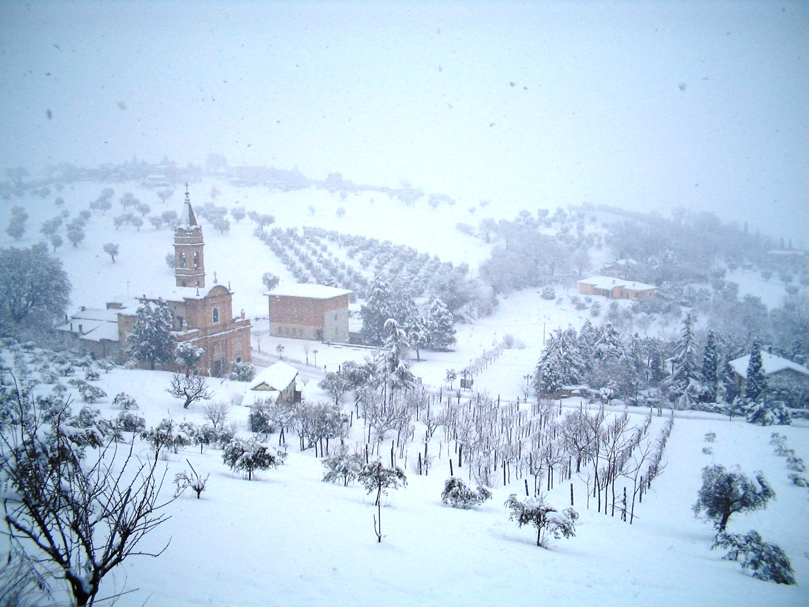 Vista della campagna di Ostra e del Santuario della Madonna della Rosa sotto la neve.